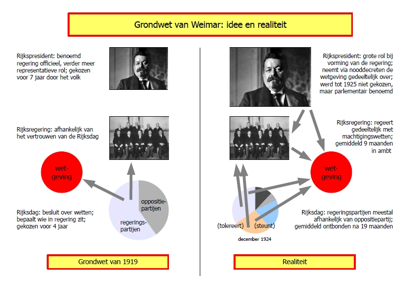 Weimar Grondwet, vereenvoudigde beschrijving van idee en realiteit